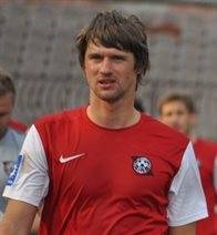 Богдан Шершун — український футболіст